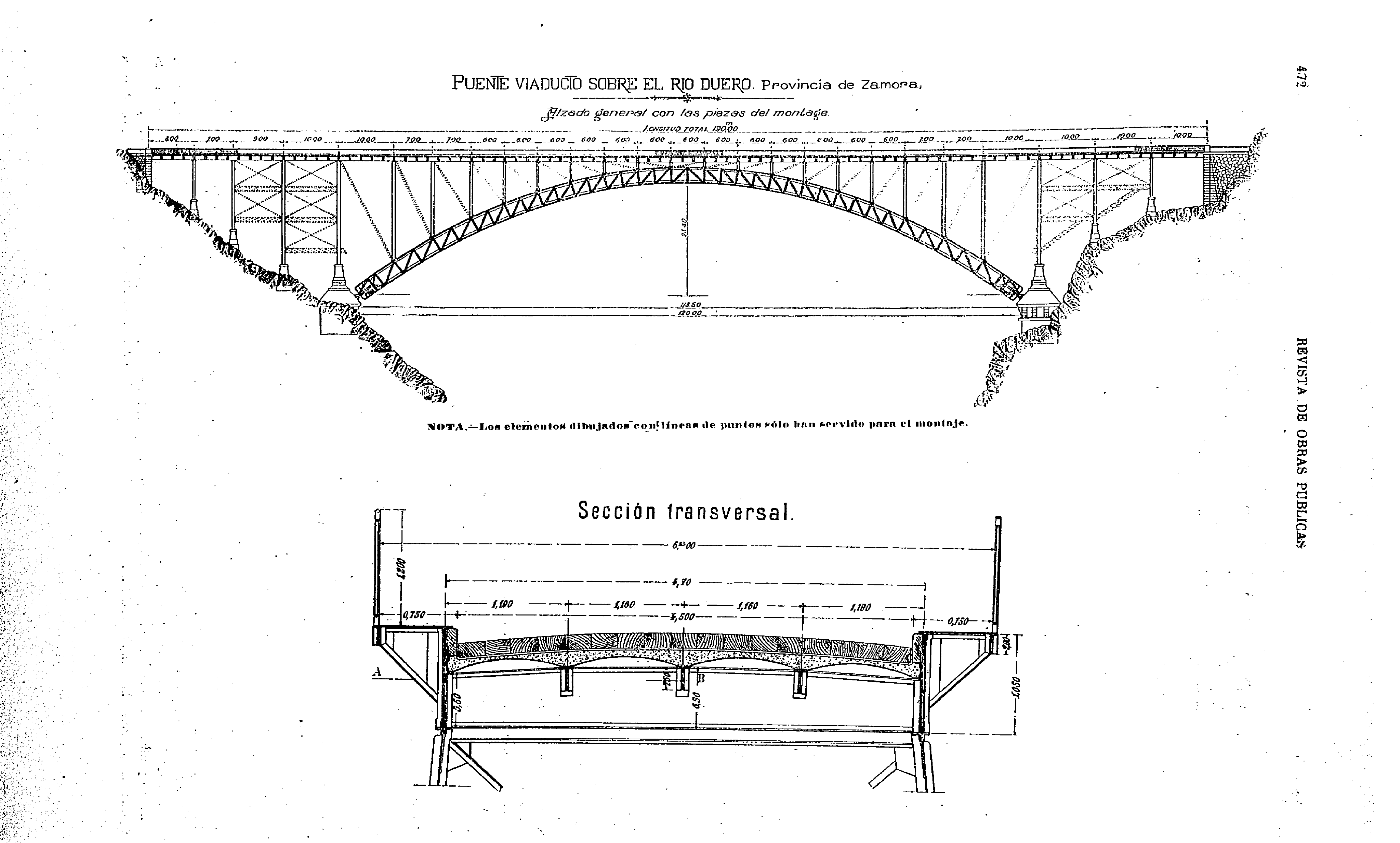 Alzado general y sección transversal del Puente de Resquejo en Zamora, España